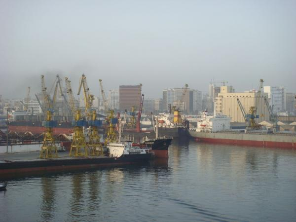 vue du port de casablanca